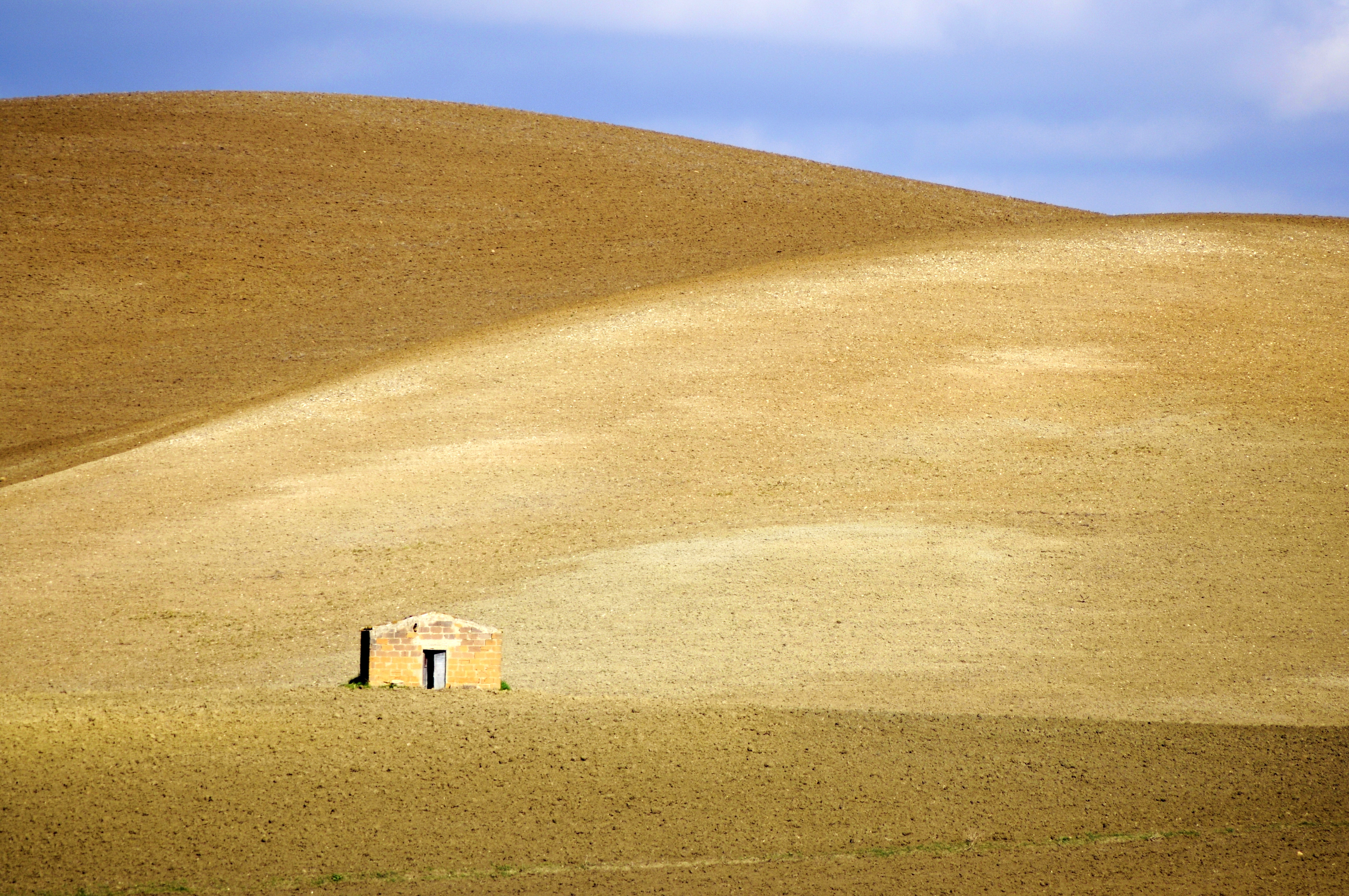 Campagne sicule